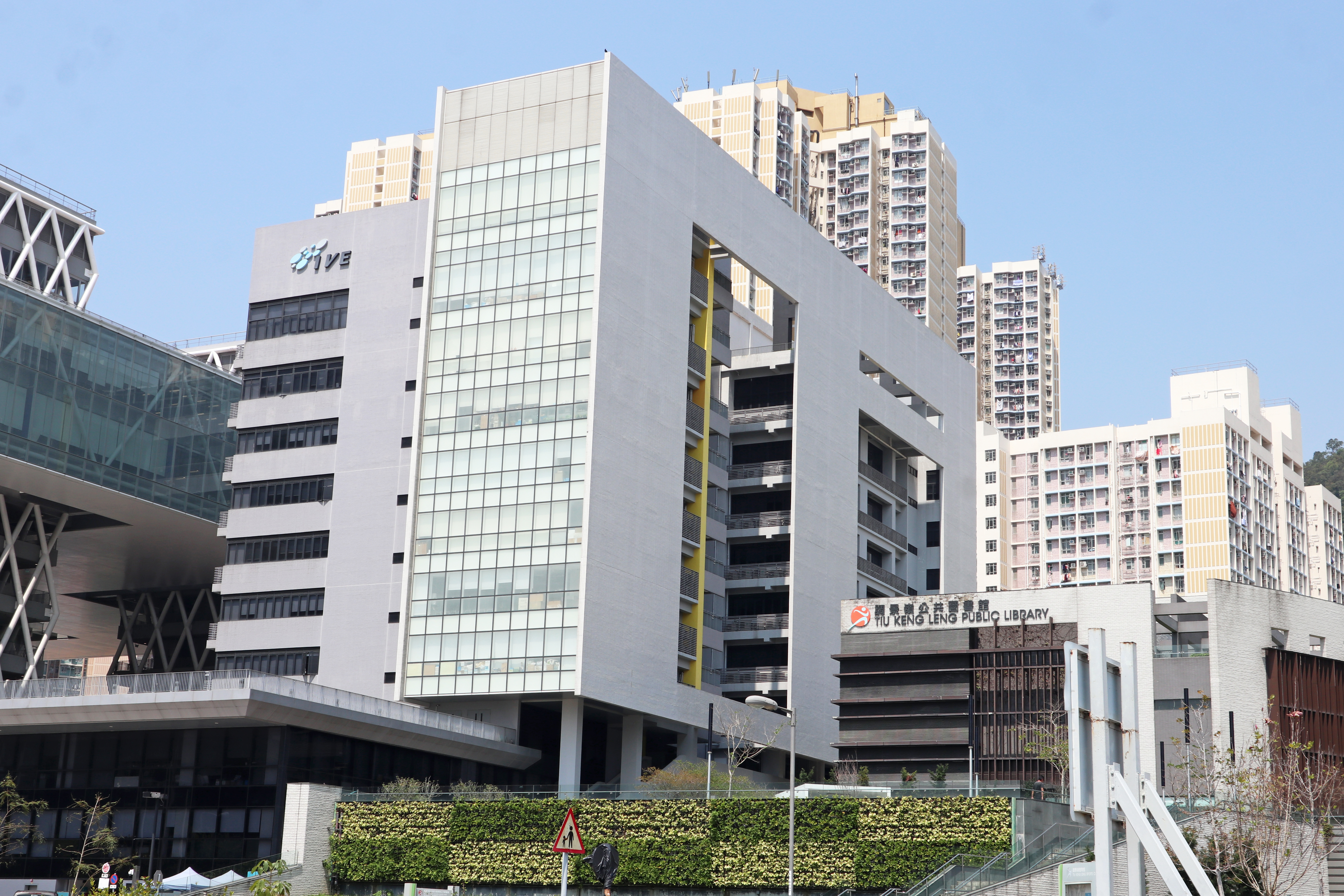 香港專業教育學院（李惠利）調景嶺校舍外觀